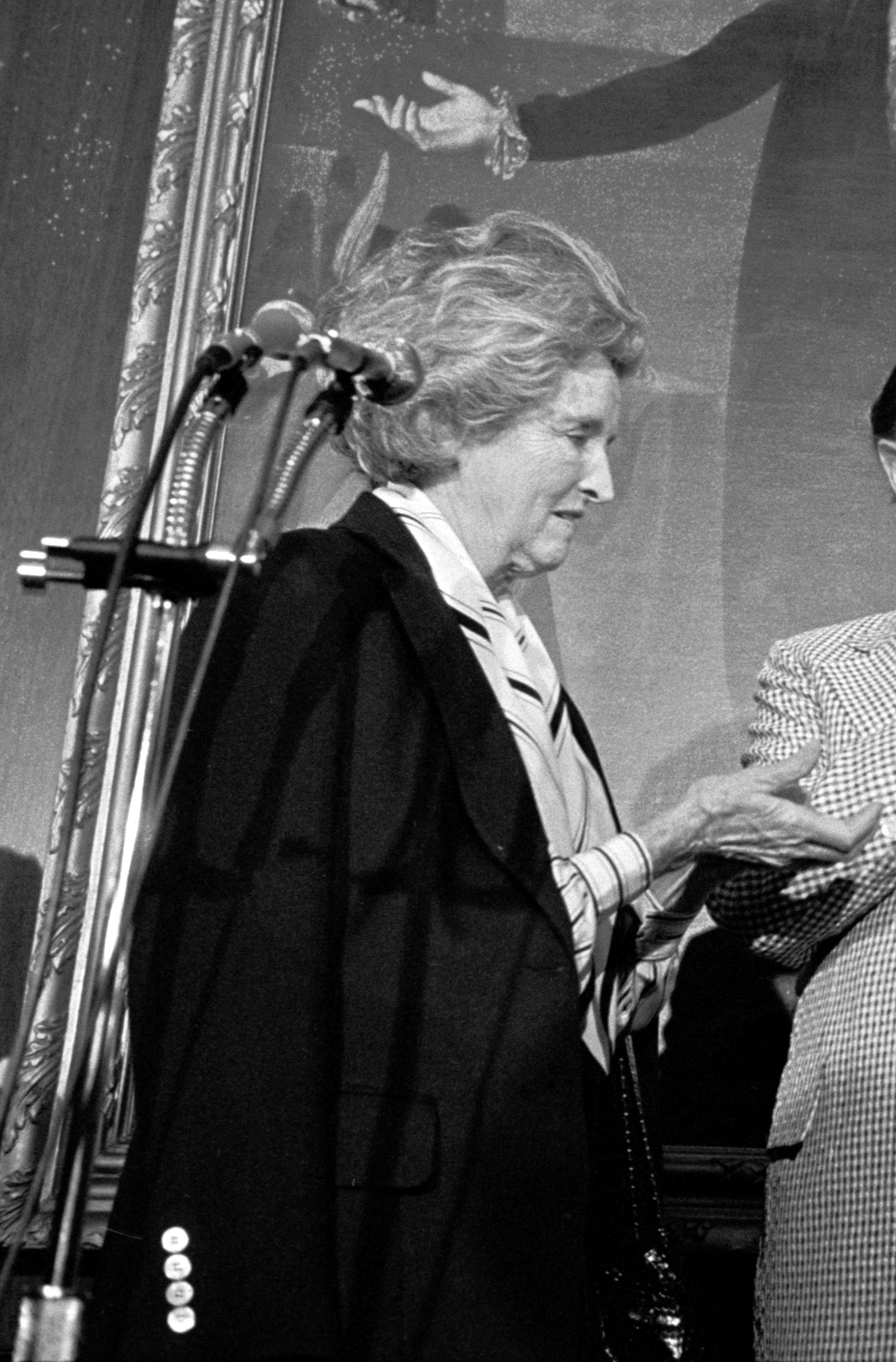 Dolores Hope